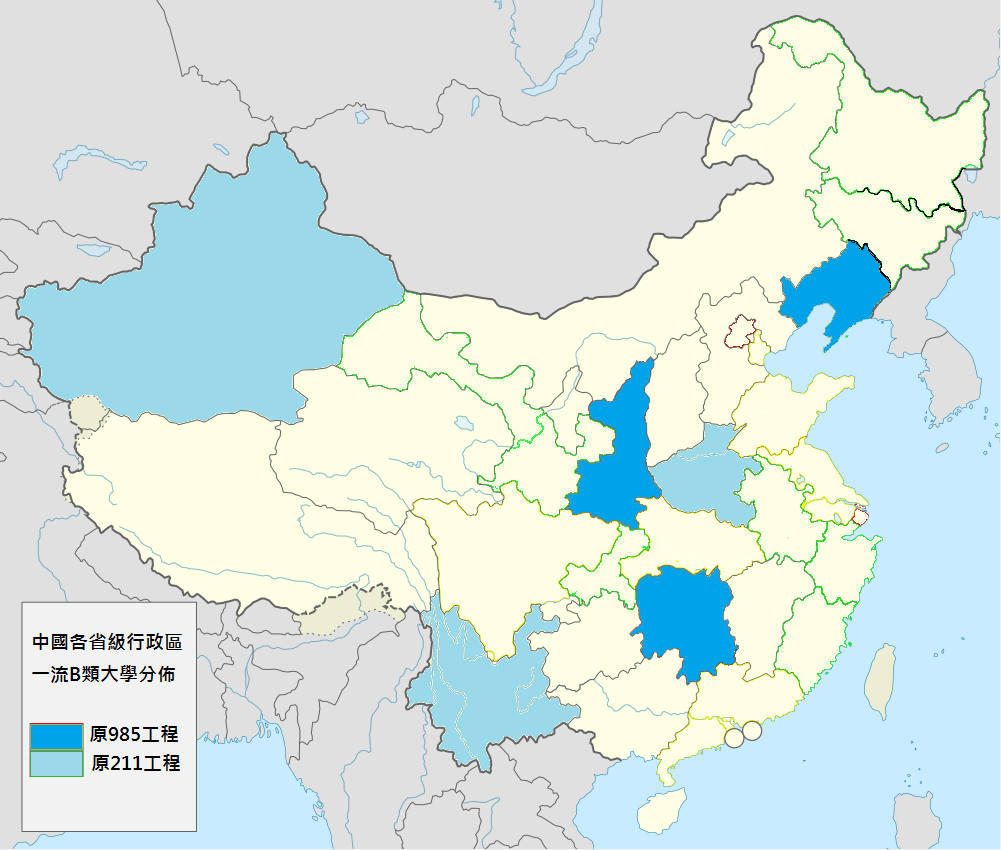 各省B類大學分佈